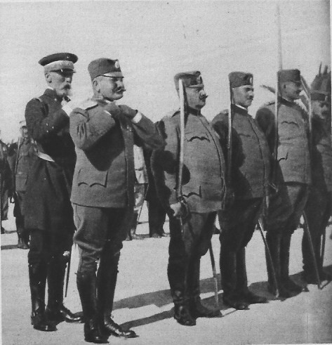 le Miroir, journal français, page_15 dans son N° 128 présente l'amiral_Guépratte_décorant le_colonel serbe_Georgevitch.